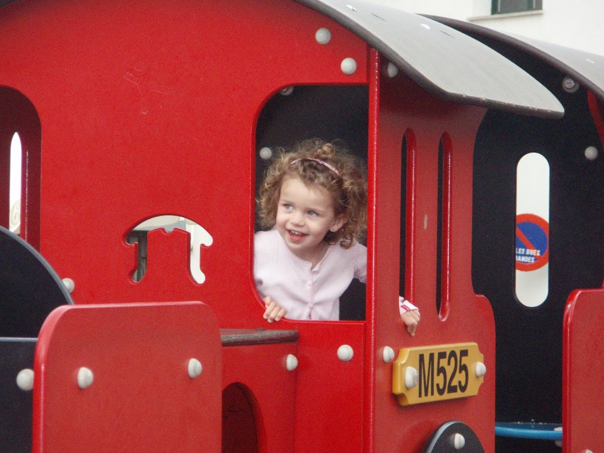 Umea poz-pozik tren gorrian